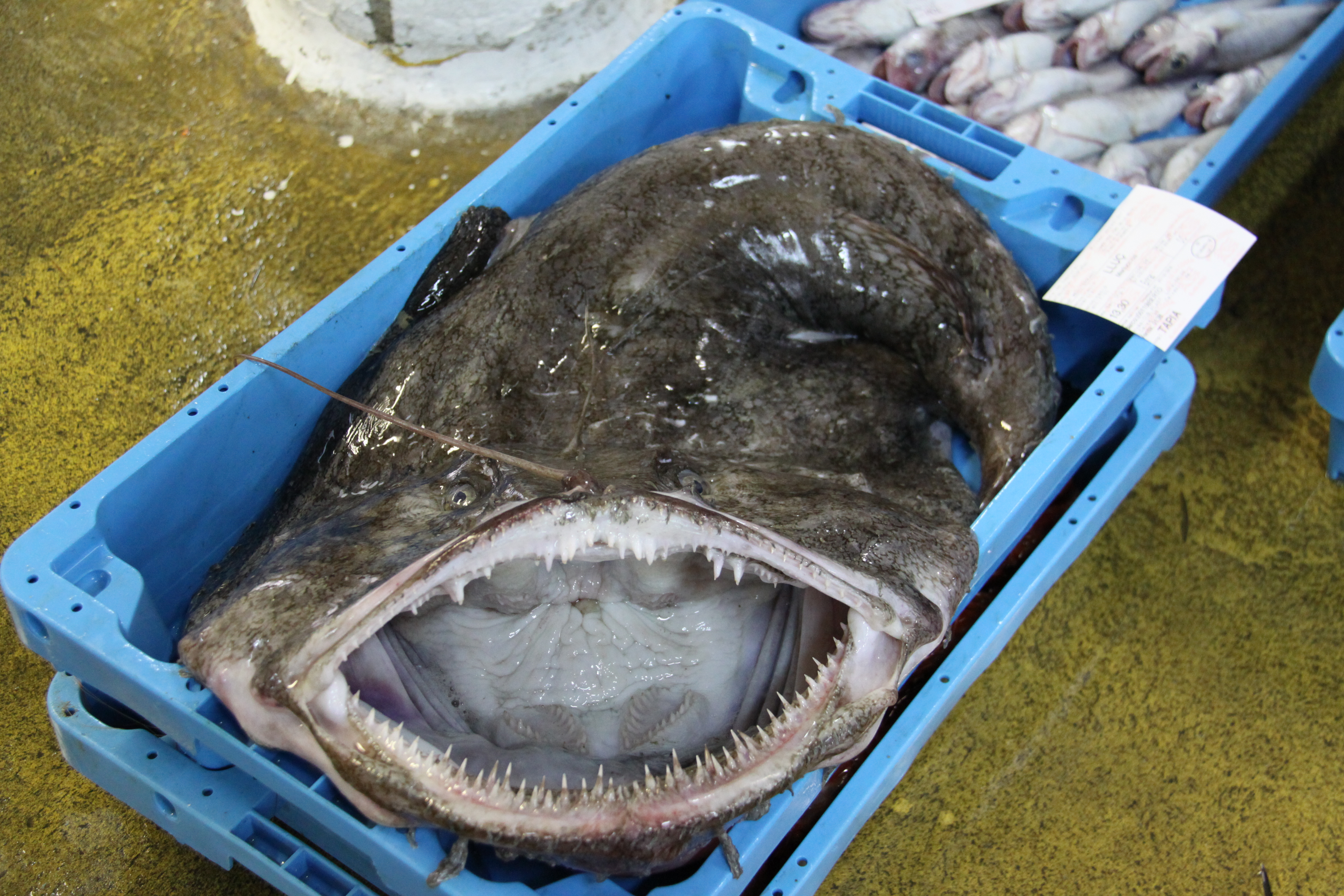 La cavité buccale (gueule) d' une baudroie commune juste pêchée et aussitôt vendue à la criée. Il est intéressant de détailler l' intéreur de cette cavité buccale. Cette photographie a été prise à la criée (llotja de peix) d' El Port de la Selva, Catalogne, Espagne.